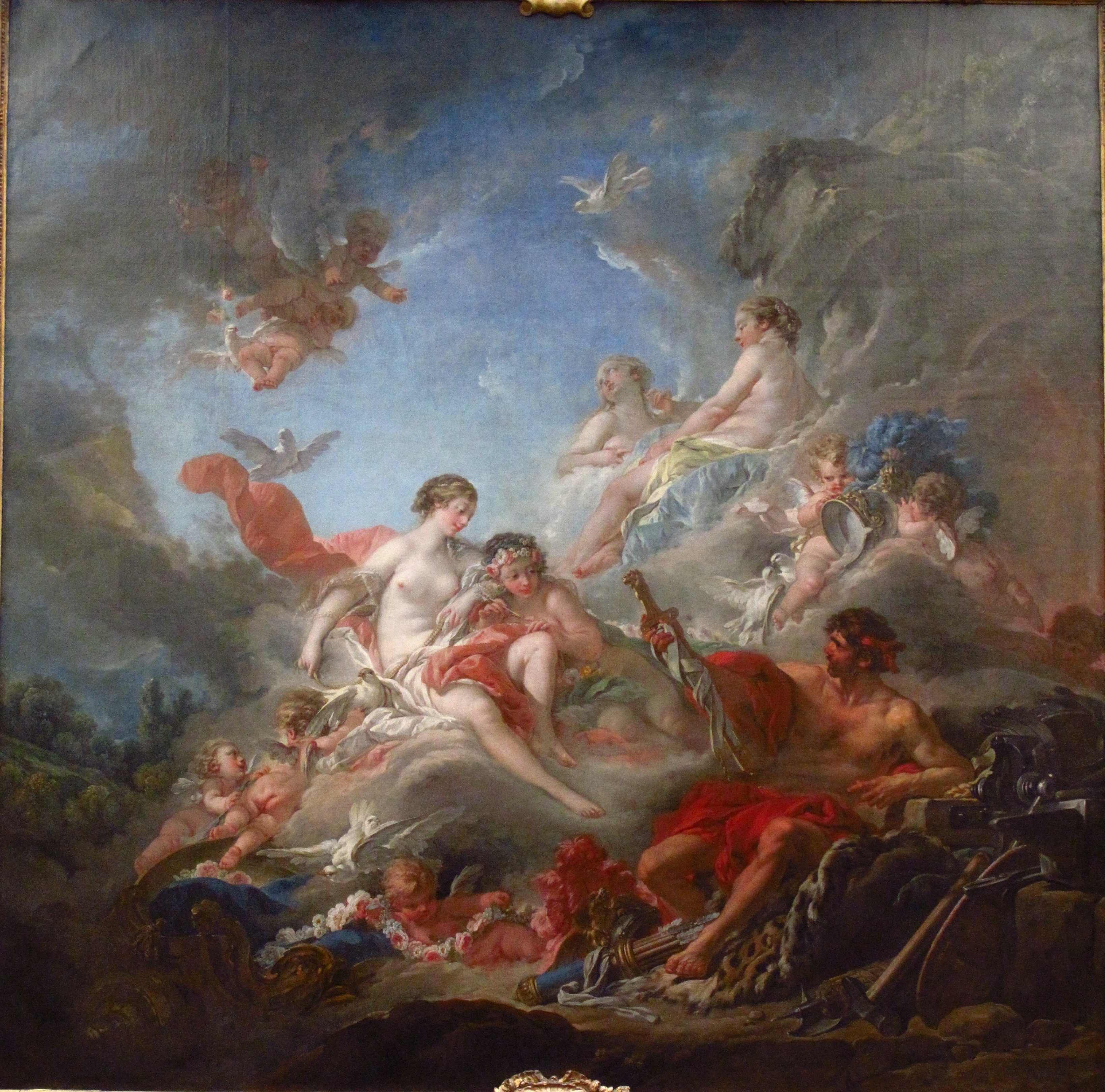 Vulcain montre à Vénus les armes qu'il a fabriqué dans ses forges pour Énée.